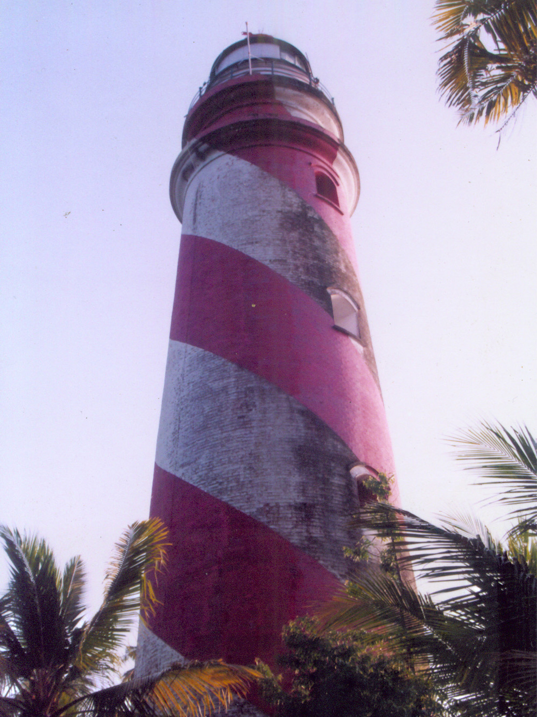 തങ്കശ്ശേരി വിളക്കുമാടം